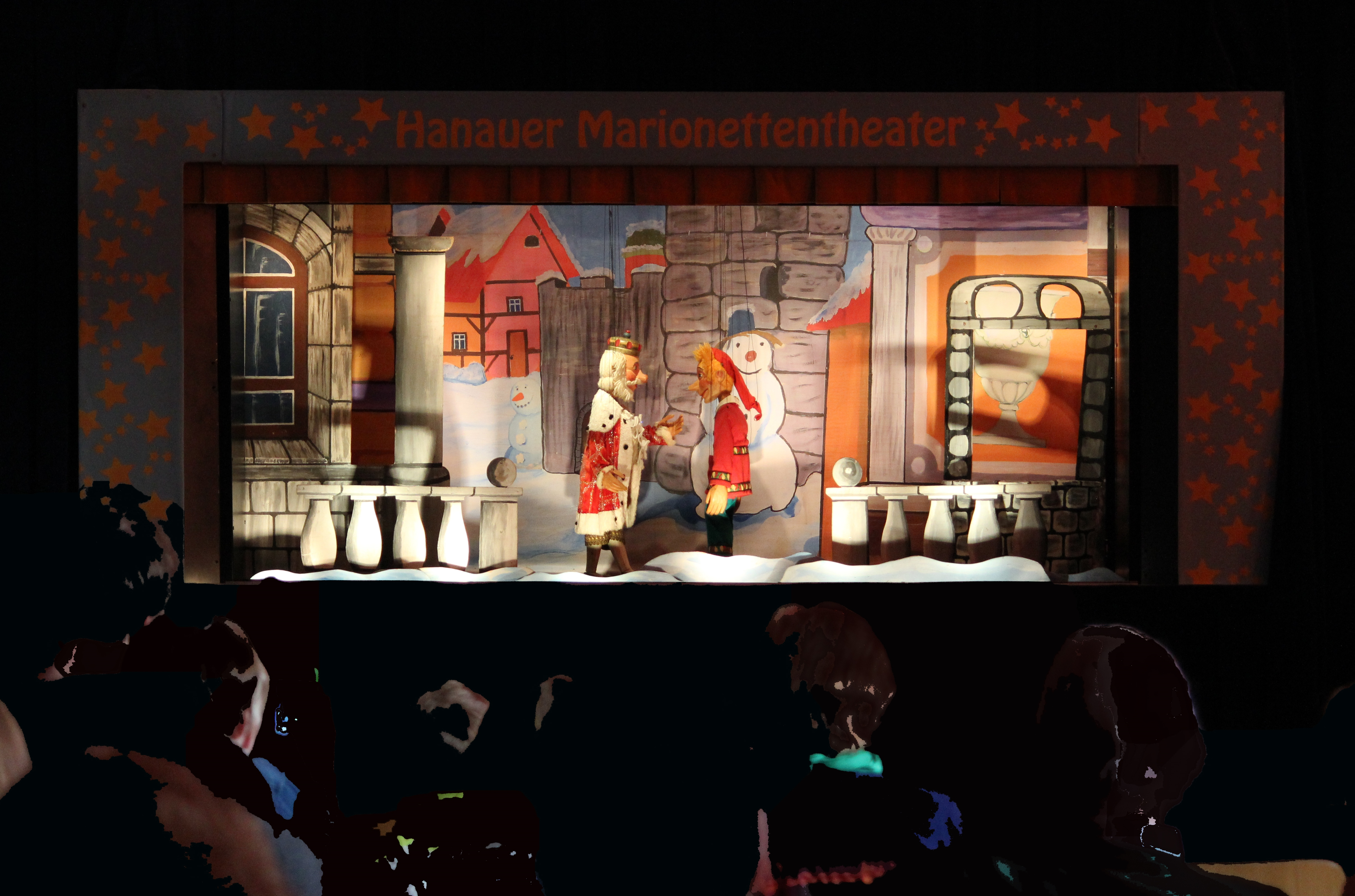 Aufführung des Hanauer Marionettentheaters